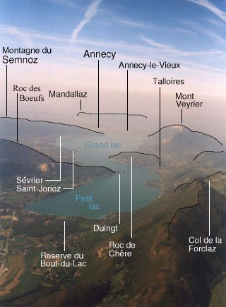 Lac d'Annecy - vue d'avion au sud du lac, avec légende. Cette photo est la version légendée avec noms des sommets, villes.